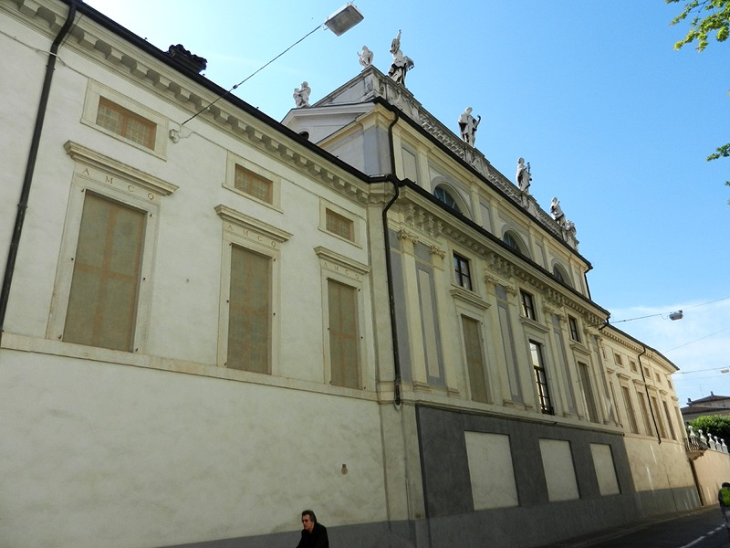 Brescia - Biblioteca Queriniana